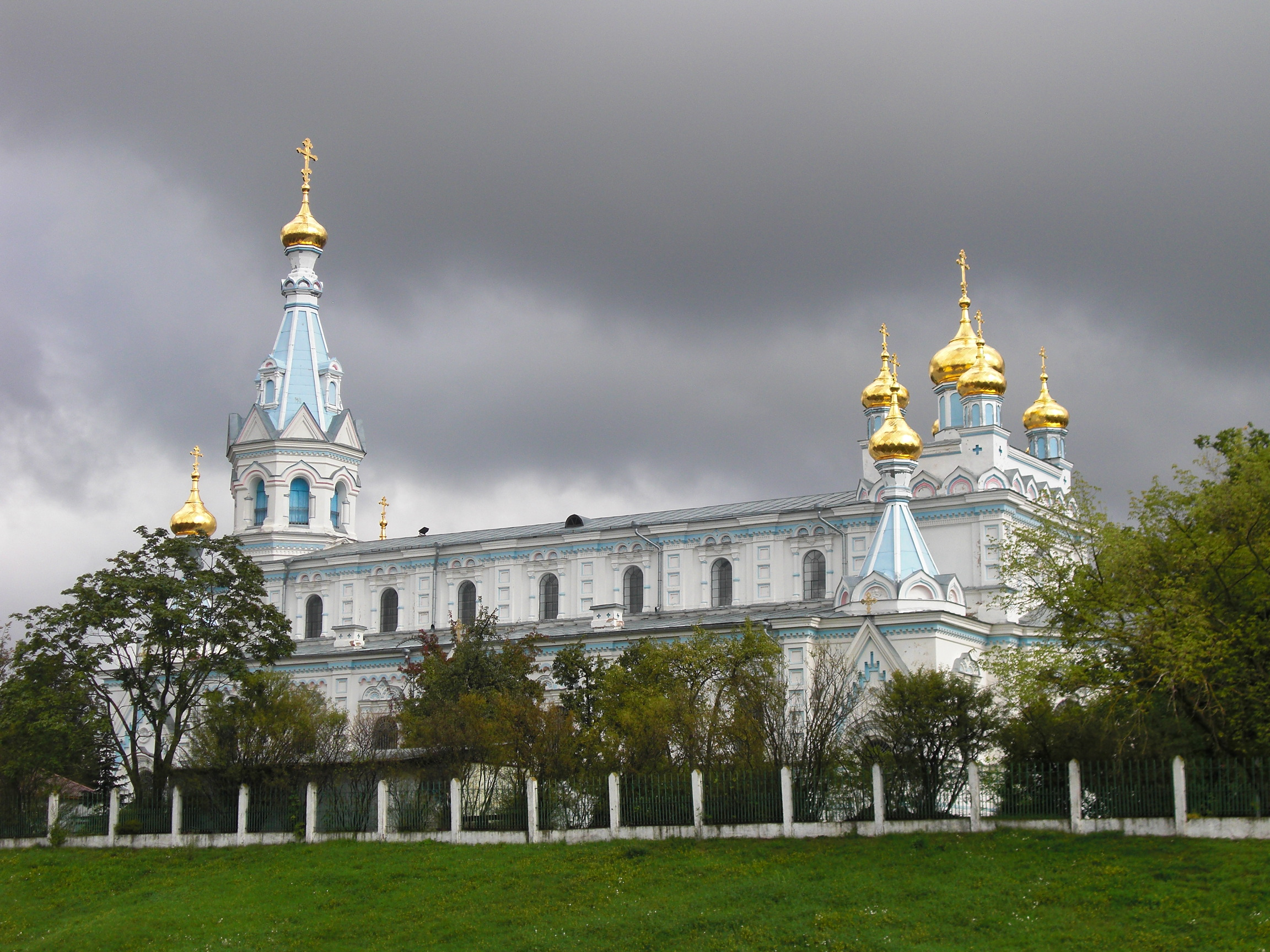 Daugavpils Borisa un Gļeba pareizticīgo katedrāle